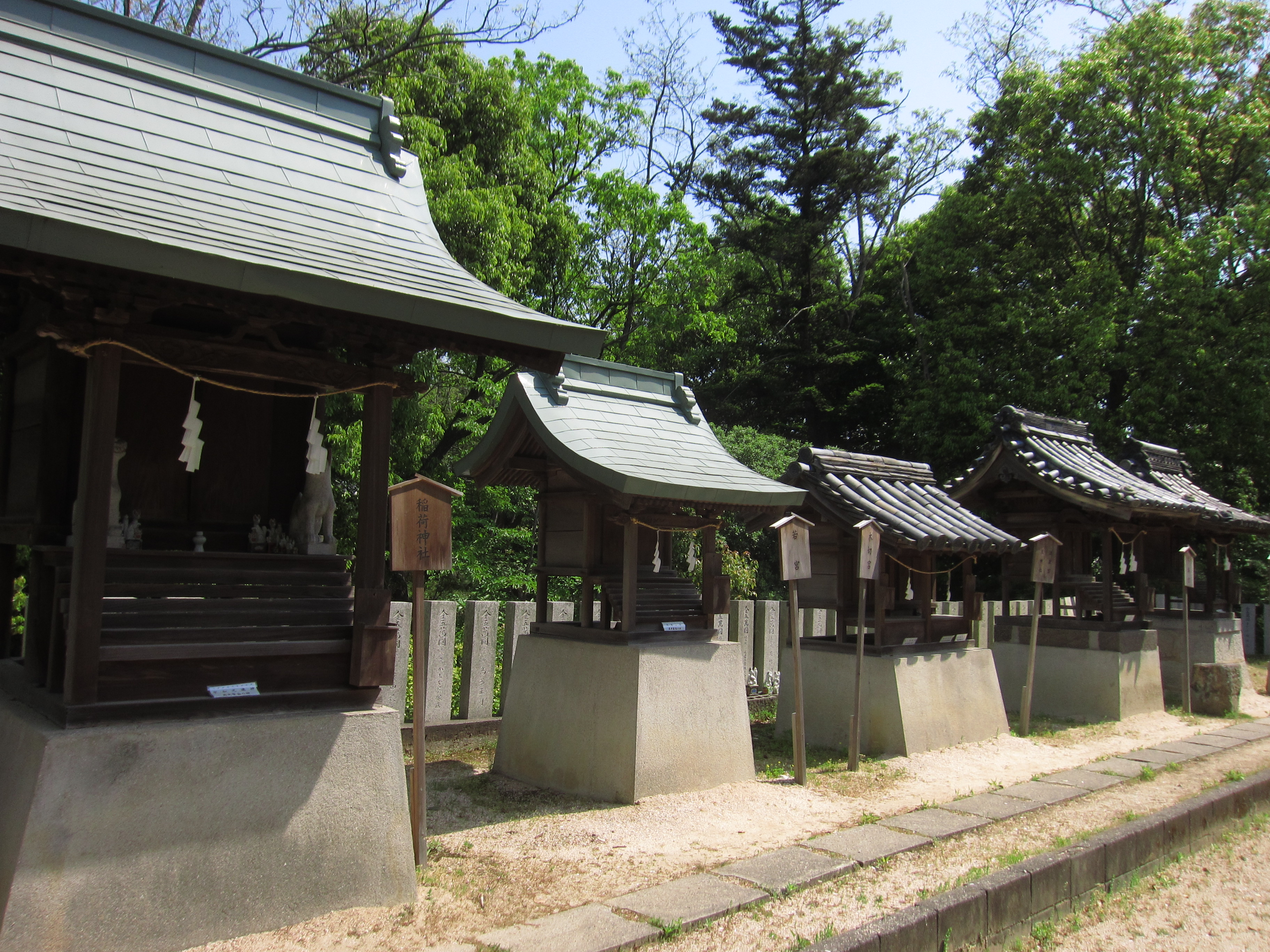 尾針神社 境内社